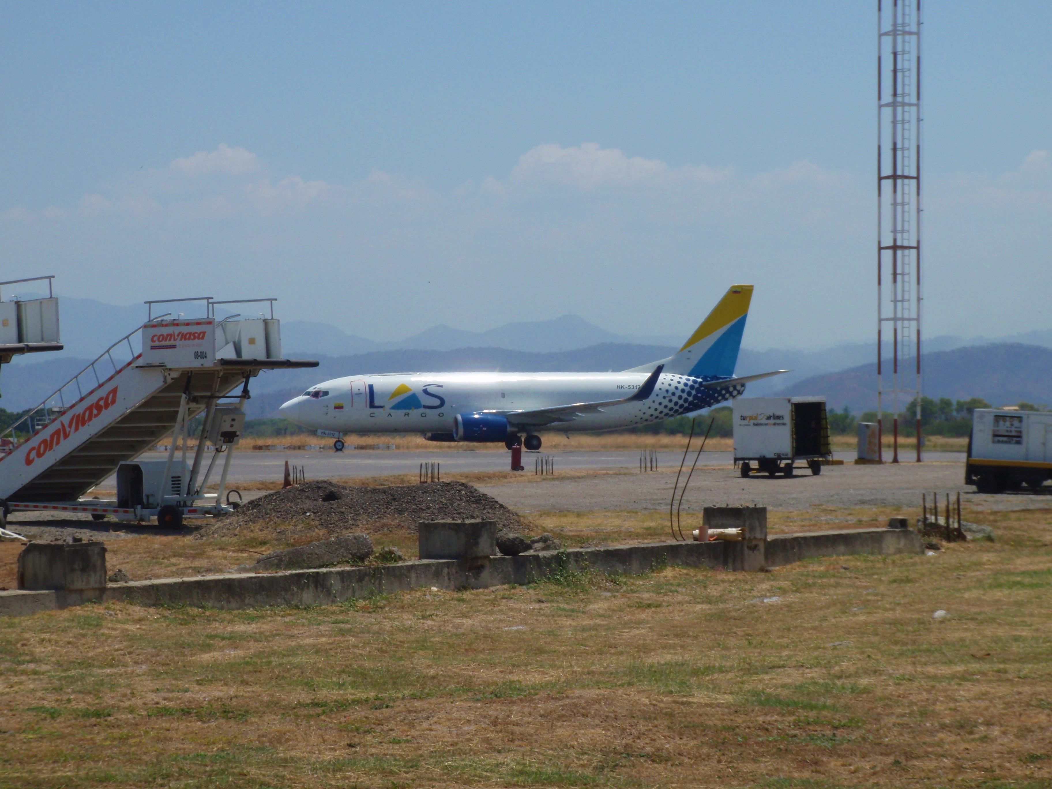 Las Cargo taxeando al terminal de carga en el Aeropuerto Internacional Arturo Michelena